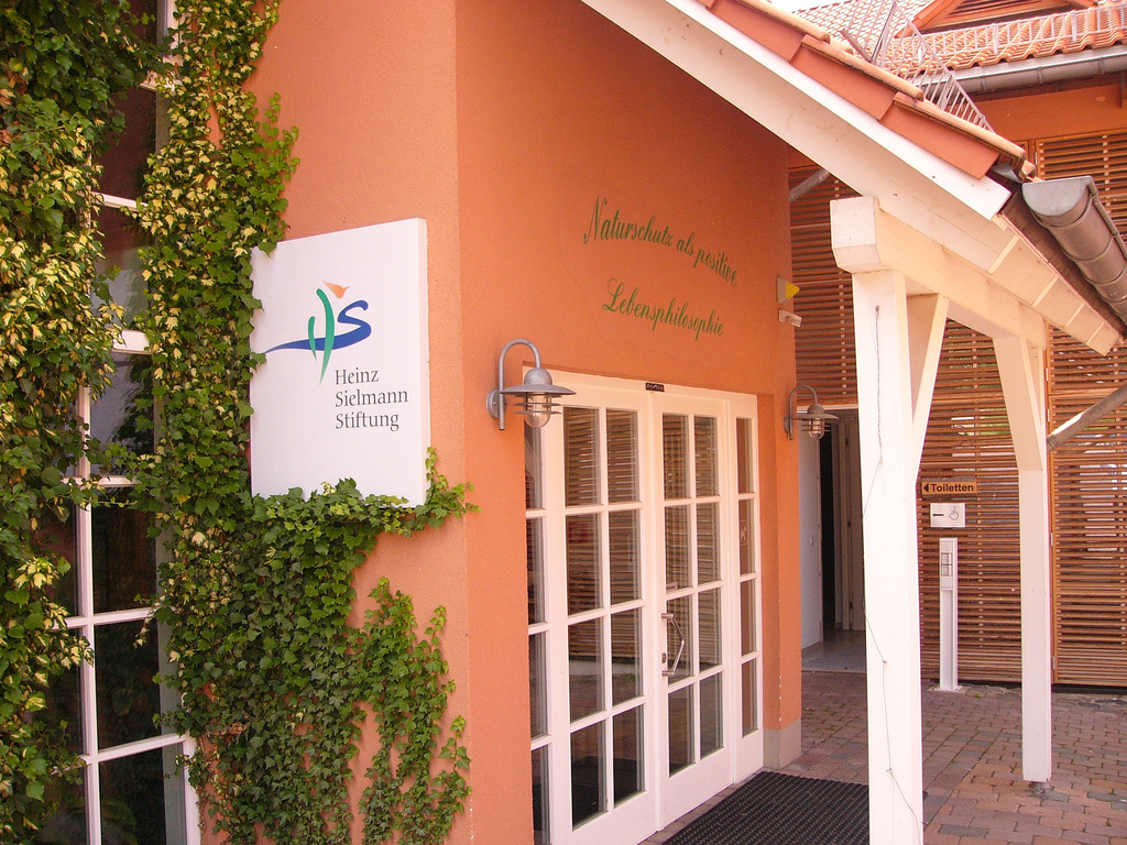 Eingangsbereich der Zentrale der Heinz-Sielmann-Stiftung auf Gut Herbigshagen mit dem Stiftungsmotto und -logo